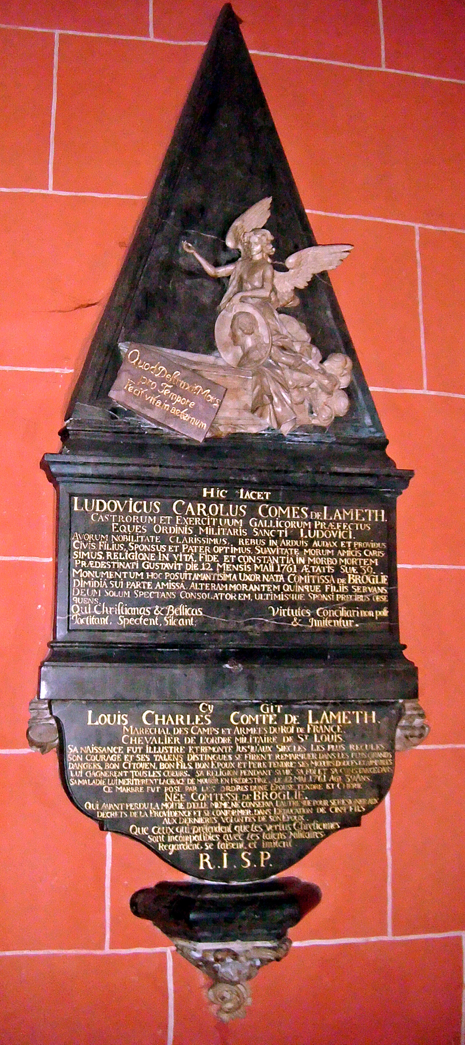 Epitaph des französischen Feldmarschalls Ludwig Karl von Lameth (1723-1761) im Frankfurter Dom